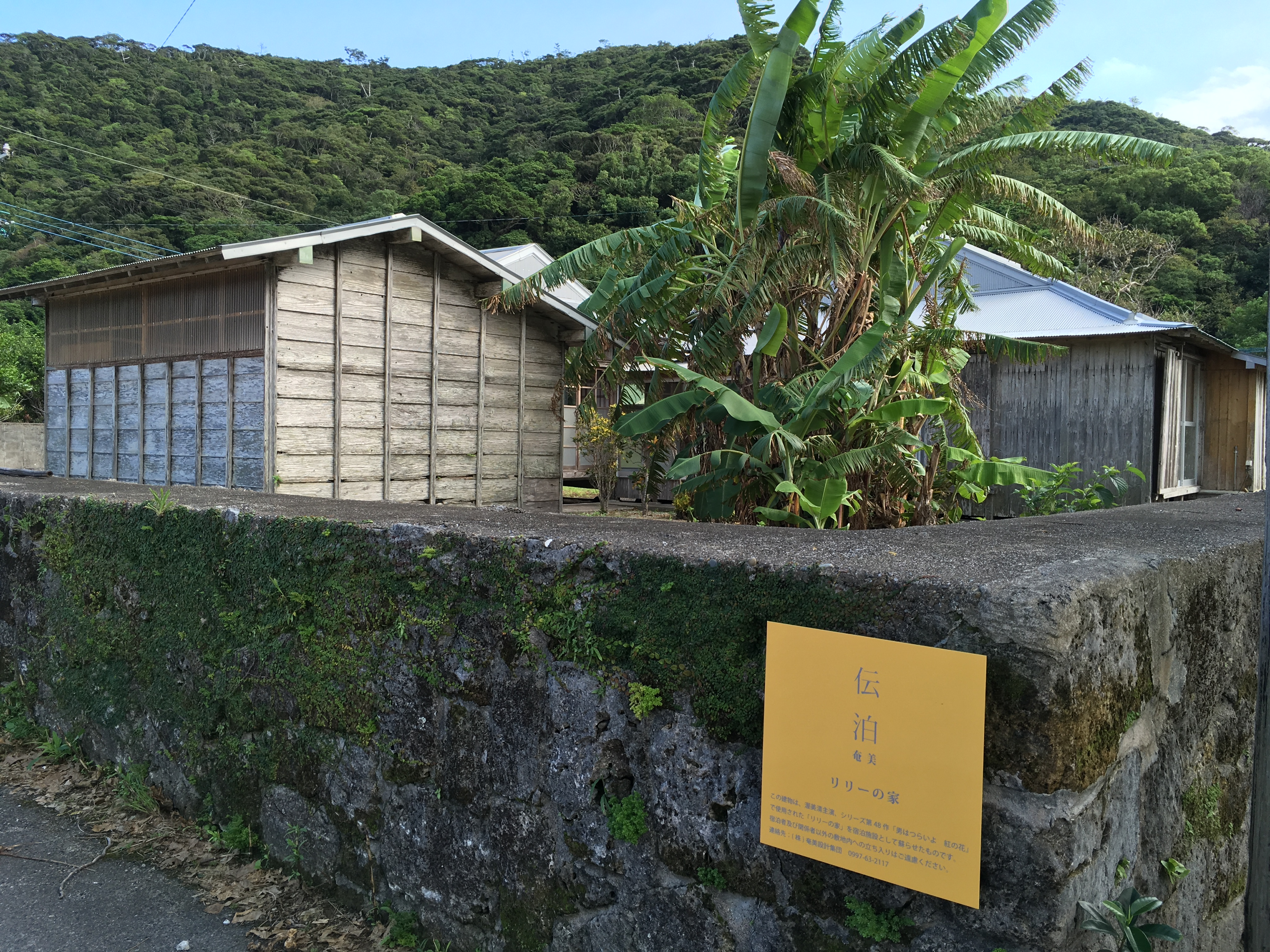 加計呂麻島で寅さんと浅岡ルリ子が暮らしたリリーの家